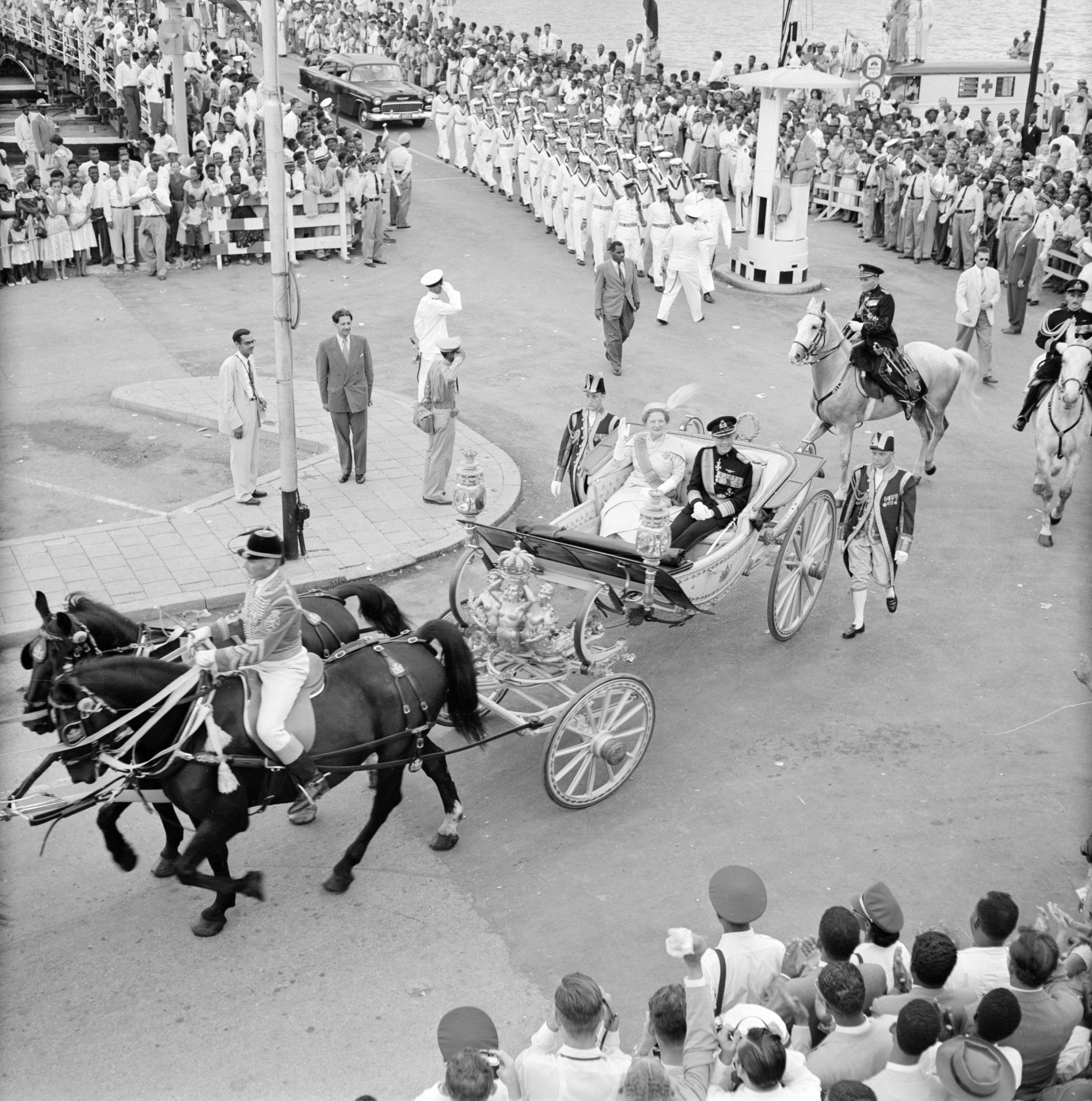 Collectie / Archief : Fotocollectie Van de Poll Reportage / Serie : Nederlandse Antillen en Suriname ten tijde van het koninklijk bezoek van koningin Juliana en prins Bernhard in 1955 Beschrijving : De calèche met het koninklijk paar verlaat de Emmabrug in Willemstad Annotatie : De calèche en de paarden waren speciaal uit Nederland overgevaren Datum : 19 oktober 1955 Locatie : Curaçao, Nederlandse Antillen, Willemstad Trefwoorden : koninklijke bezoeken, paarden, publiek, straatbeelden Persoonsnaam : Bernhard, prins, Juliana, koningin Fotograaf : Poll, Willem van de Auteursrechthebbende : Nationaal Archief Materiaalsoort : Negatief (zwart/wit) Nummer archiefinventaris : bekijk toegang 2.24.14.02 Bestanddeelnummer : 252-3607